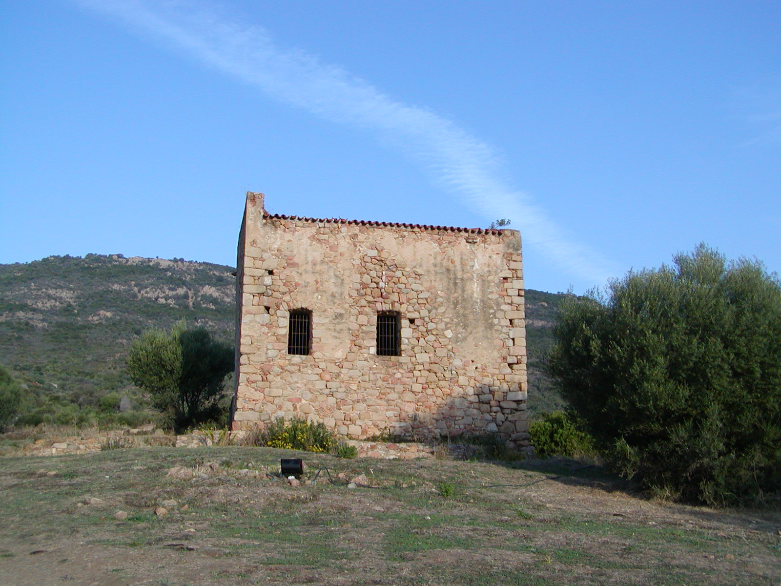 Sant'Appianu (Savona)